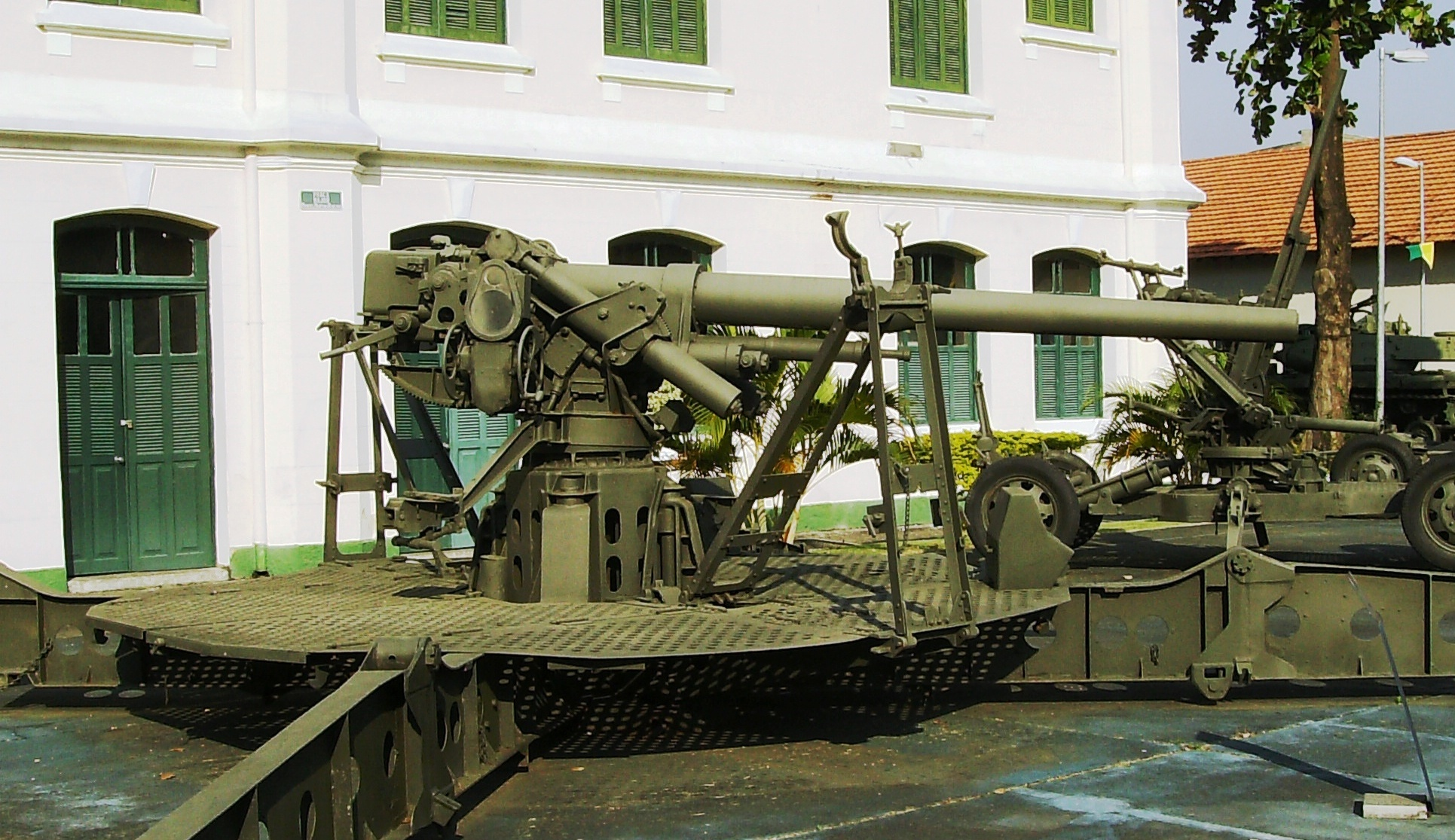 Museu Militar Conde de Linhares, Rio de Janeiro, Brasil: peças de artilharia anti-aérea.